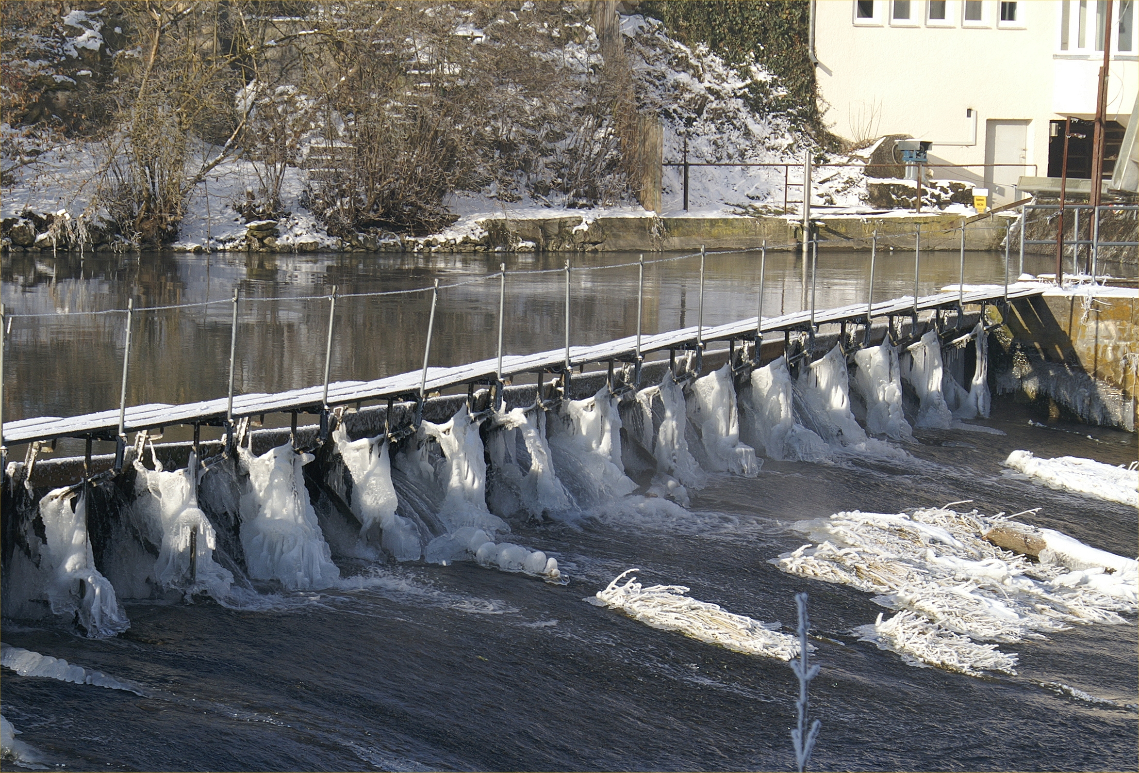 Am Donau-Wasserkraftwerk in Rechtenstein im Alb-Donau-Kreis